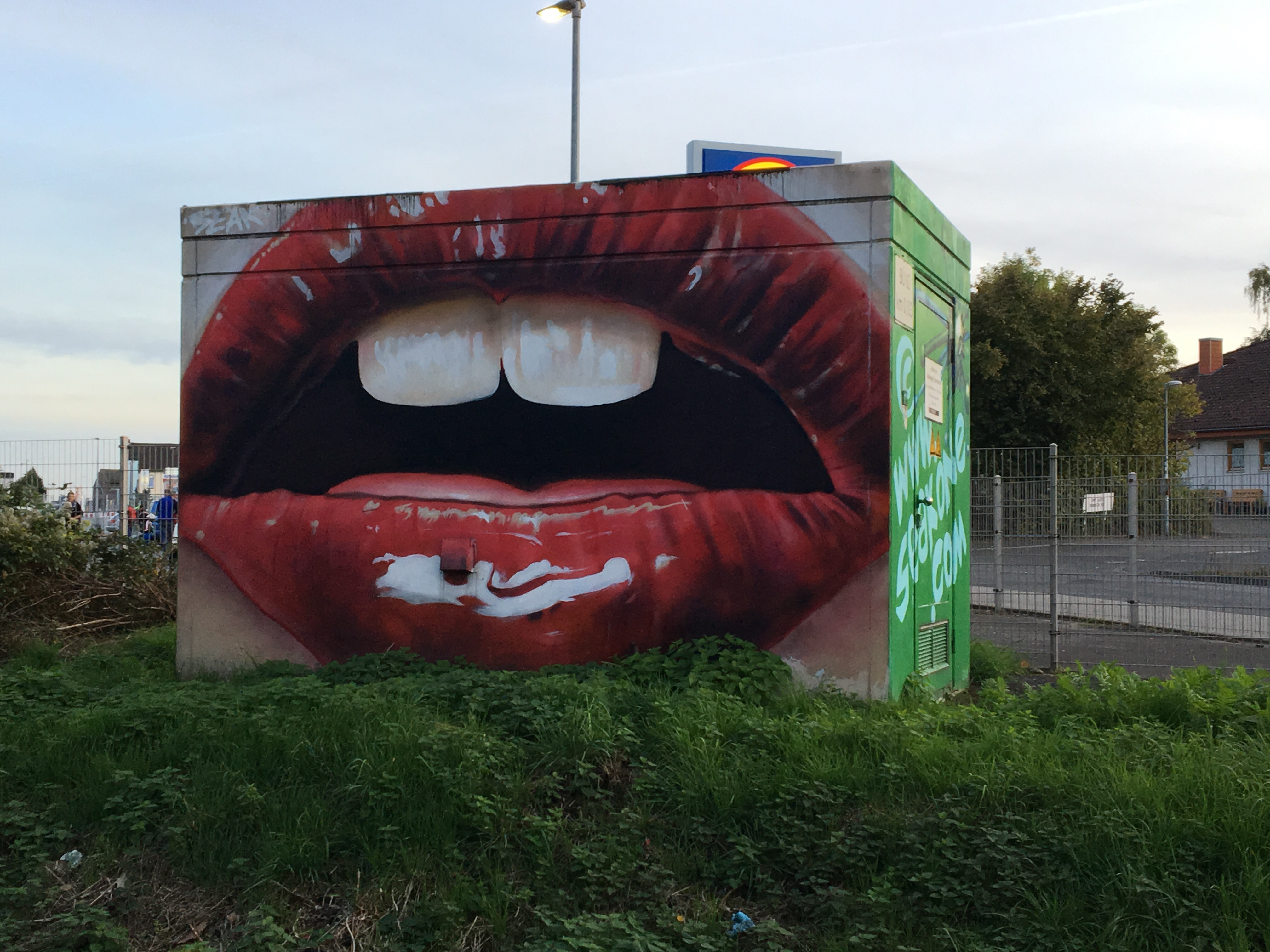 Grafitti von Seak an der Bonnstraße in Hürth